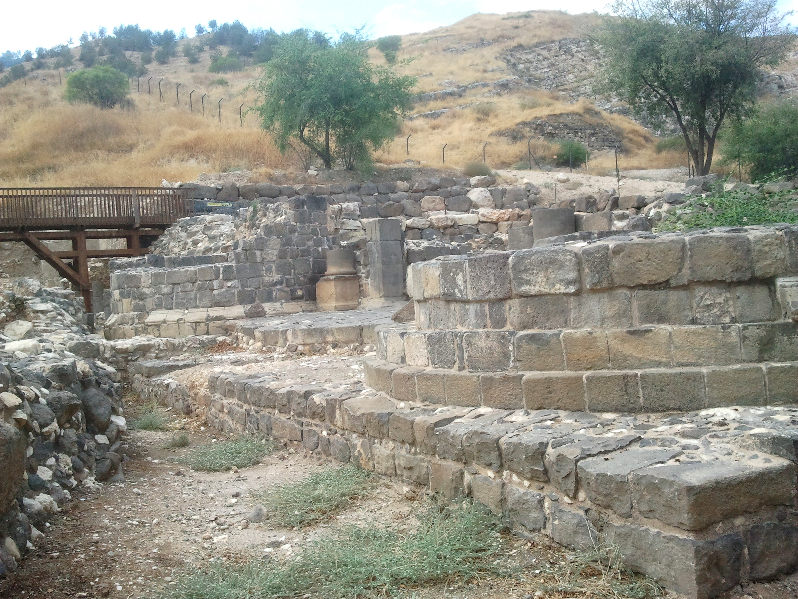 השער הרומי בדרום העיר